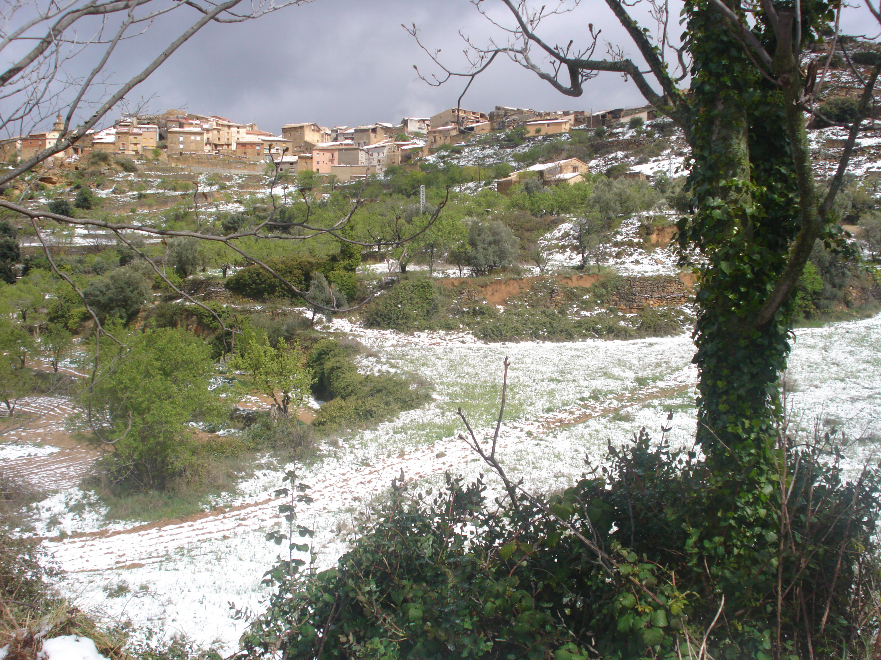 Fórnols de Matarranya después de una inesperada nevada primaveral